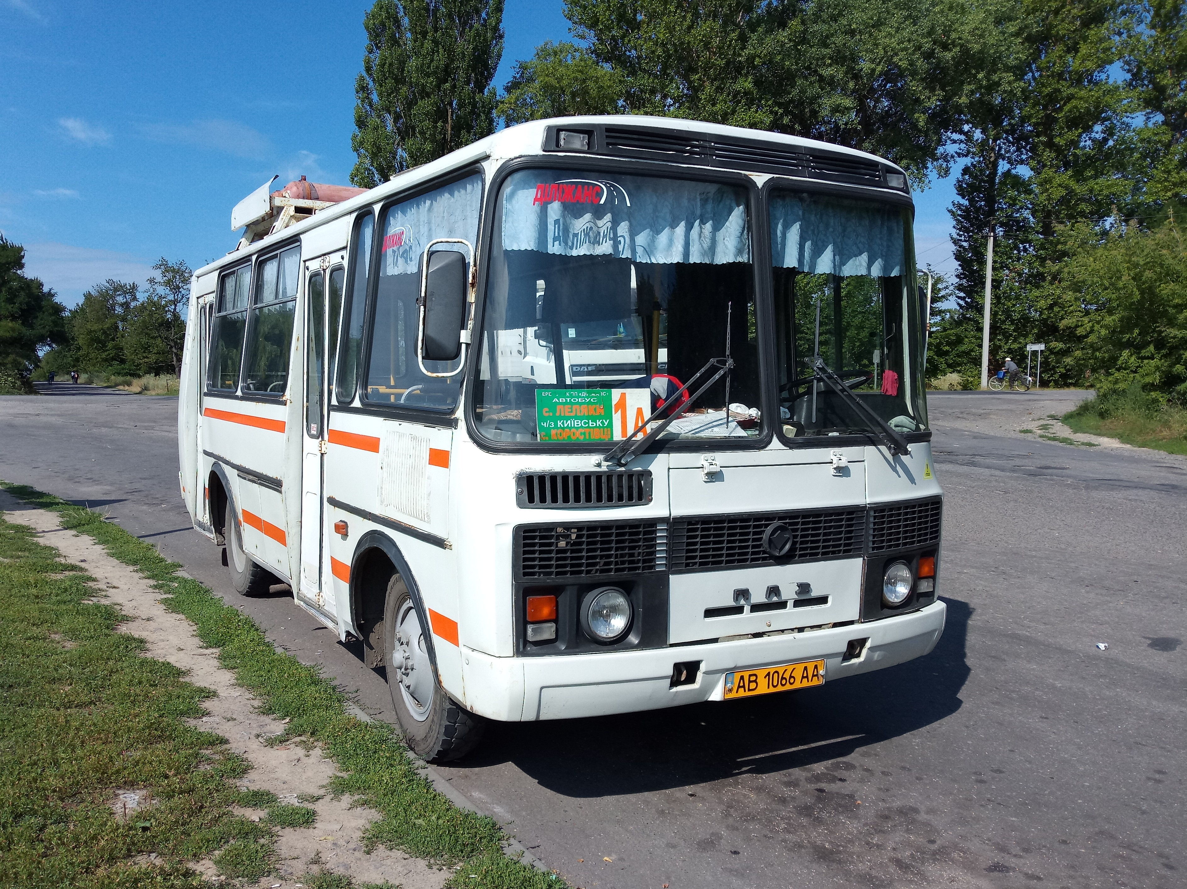 ПАЗ-32054 (40, K0, H0, L0) маршруту №1а на кінцевій зупинці "село Коростівці" у Жмеринці, Вінницька область